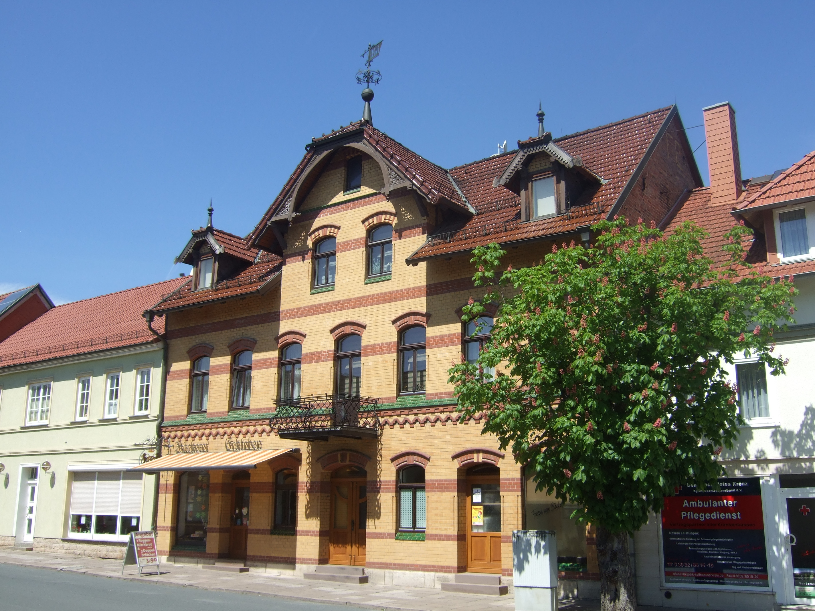 Gründerzeithaus Goethestraße 3 Ebeleben